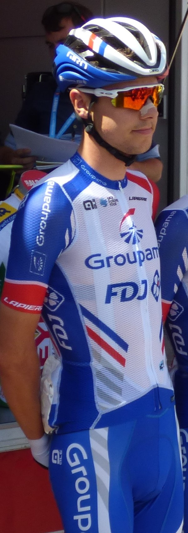 Kevin Inkelaar lors du Tour Alsace 2019